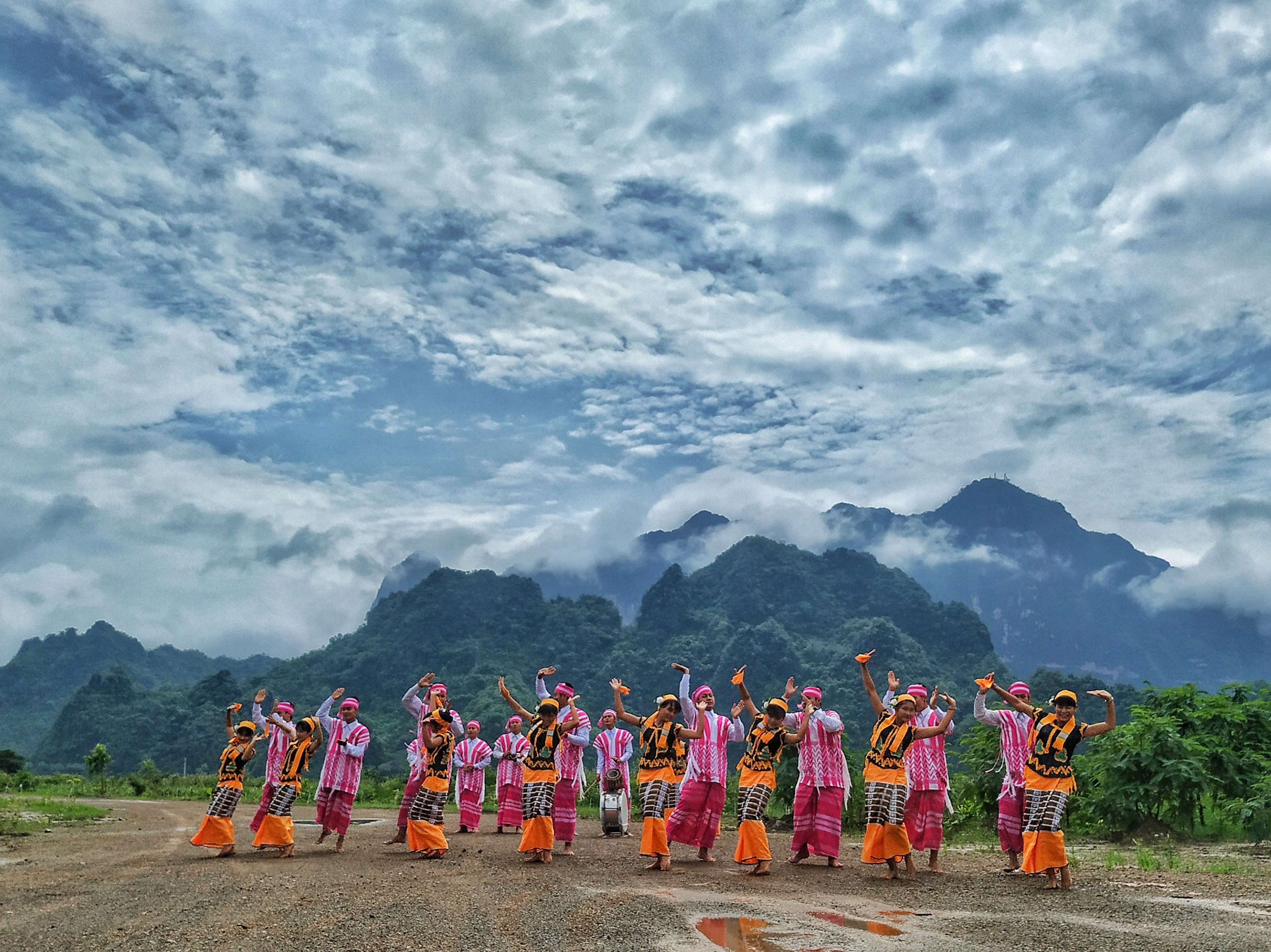 Kayin cultural dance,don dance, dances in Kayin state(Near Kauke Ka Latt pagoda)